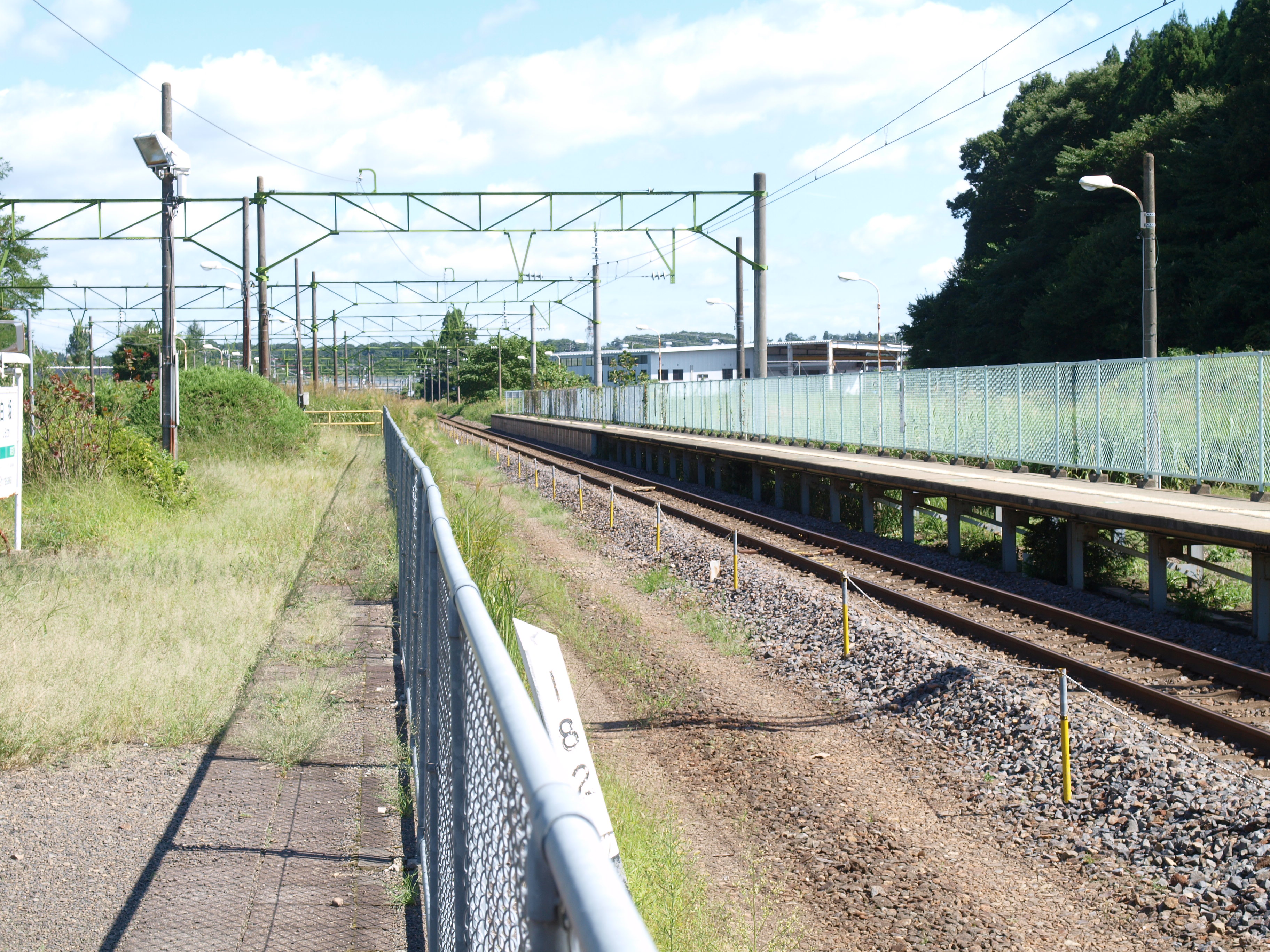 白坂駅1番線ホーム（新白河方を望む）